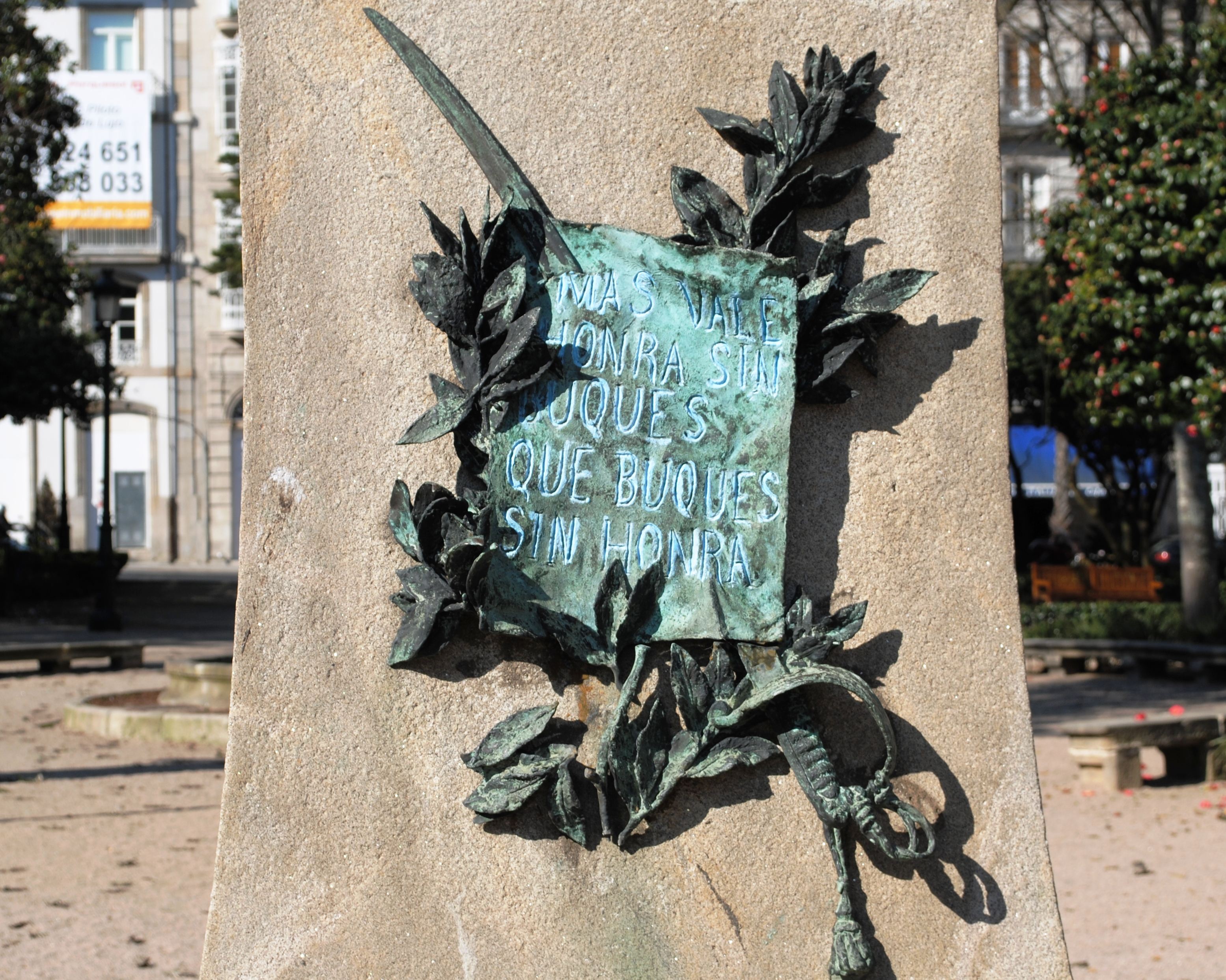 Placa en un monumento a Méndez Núñez, de 1890, en la Plaza de Compostela de Vigo. MAS VALEHONRA SINBUQUESQUE BUQUESSIN HONRA